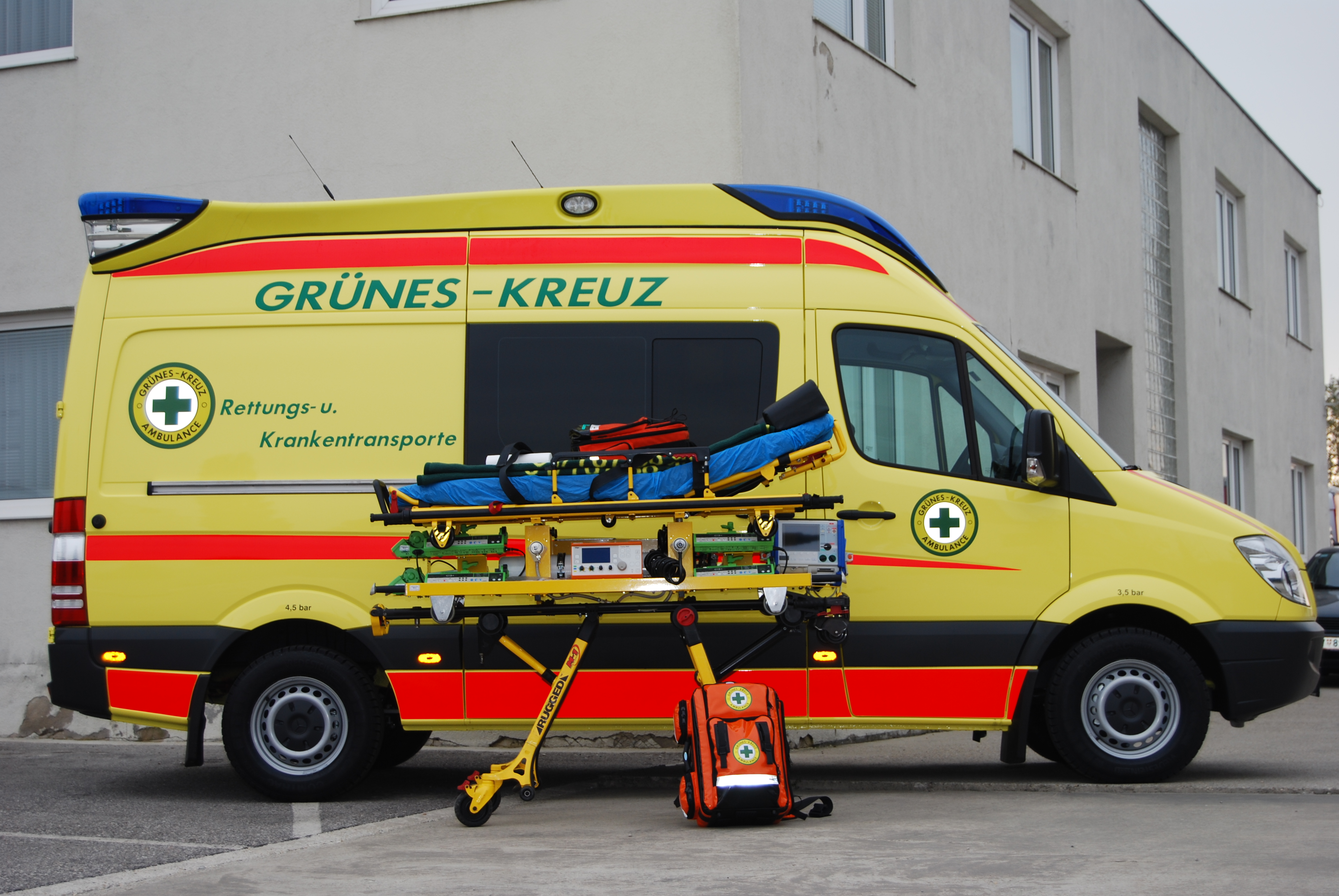 Dieses Foto zeigt einen Intensivtransporter des Grünen Kreuz. Kennung: San 100